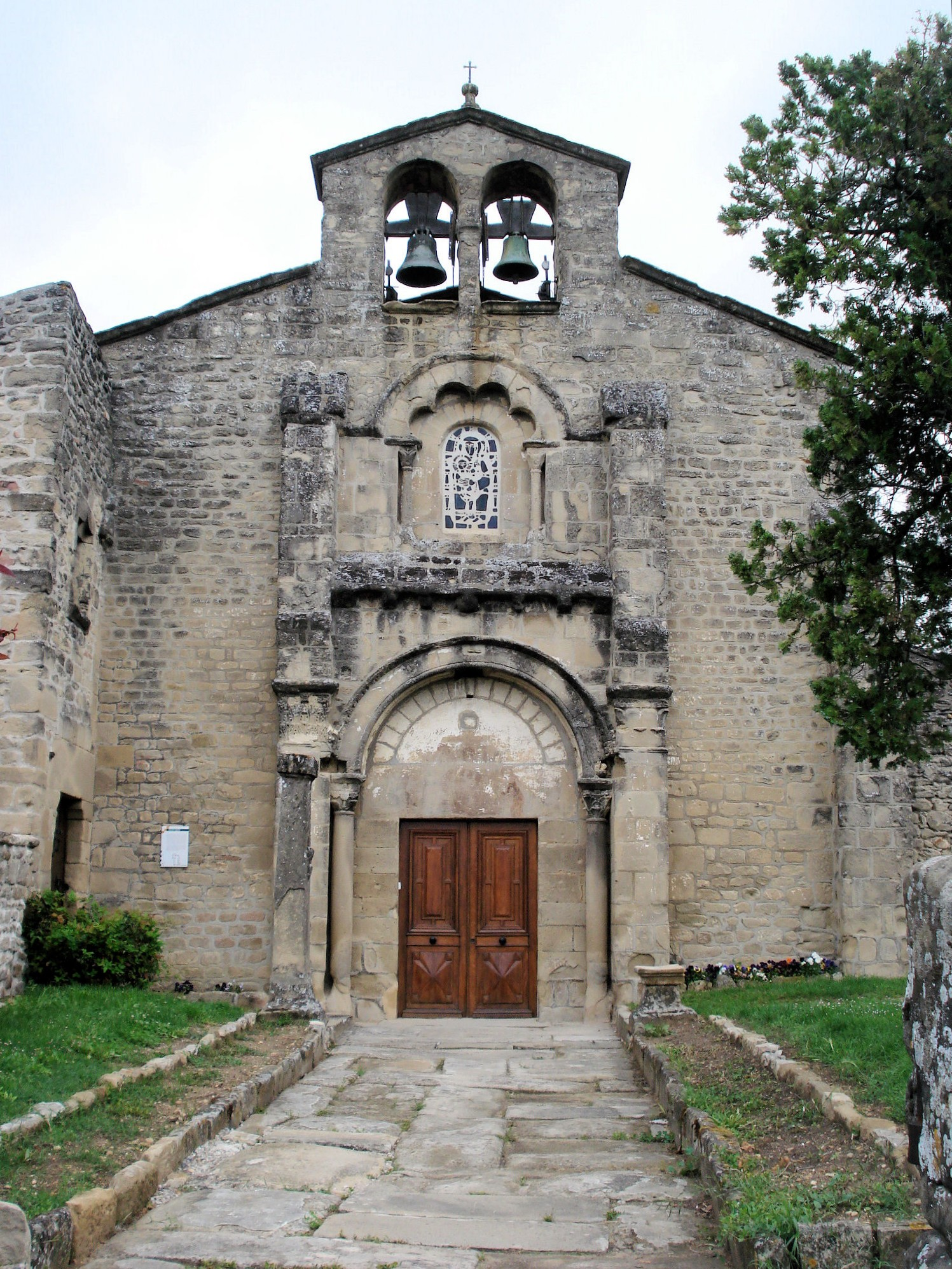 église du prieuré Sainte-Agnés de la Motte de Galaure dans la Drôme